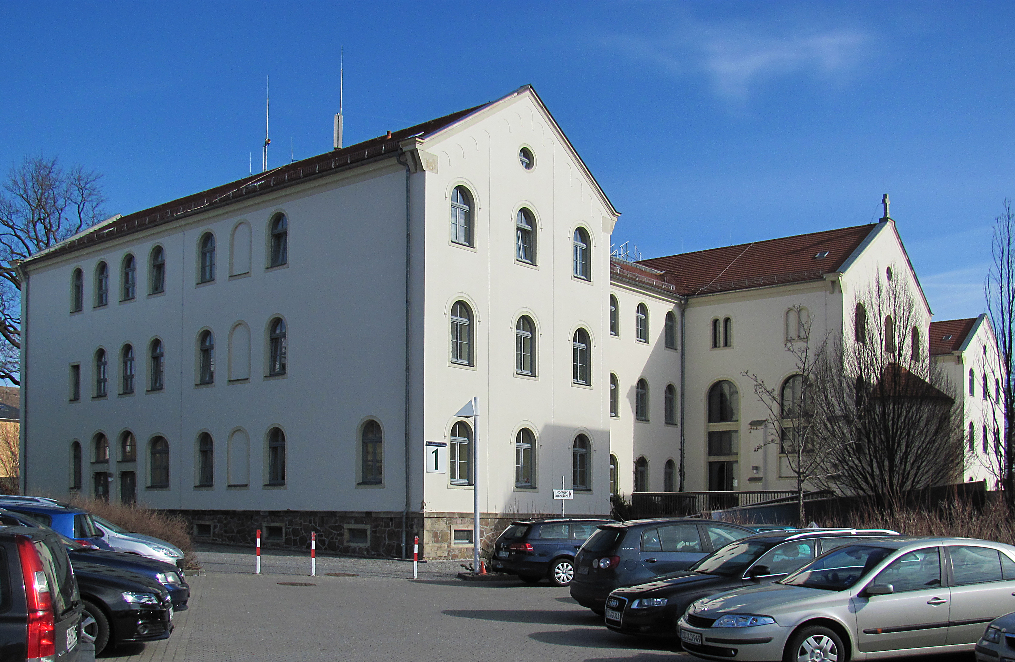 Radebeul, Elblandklinikum Radebeul, Haus 1, Raum der Stille von außen